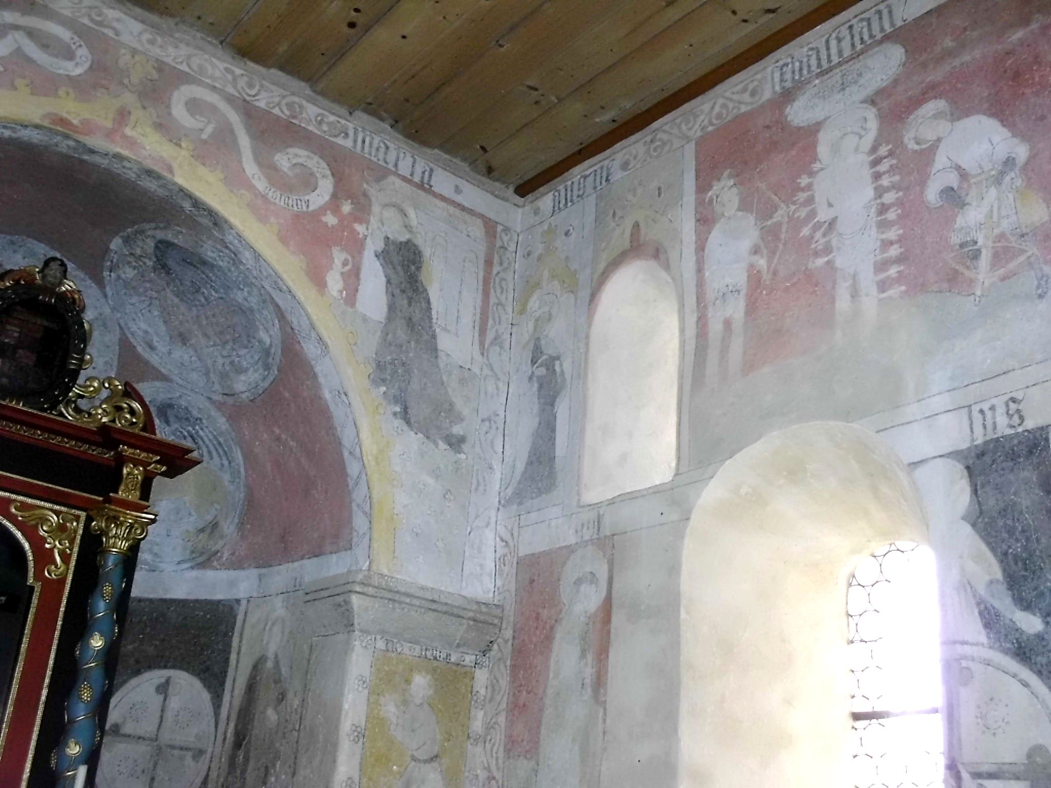 Evang.-Luth. Pfarrkirche St. Michael in Pfofeld im Landkreis Weißenburg-Gunzenhausen, Chorfresken des 15. Jahrhunderts